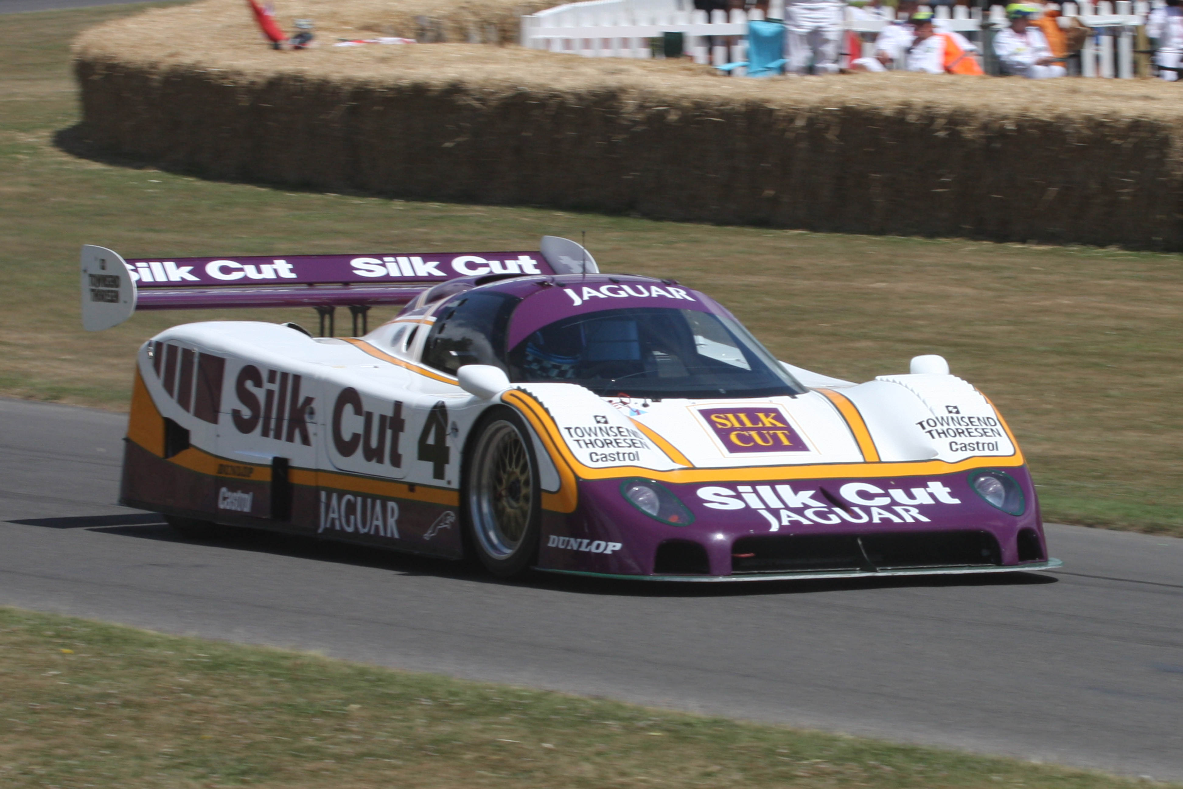 Jaguar XJR-8